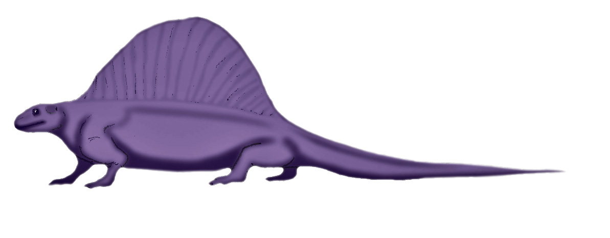 Restoration of Lupeosaurus, an extinct synapsid